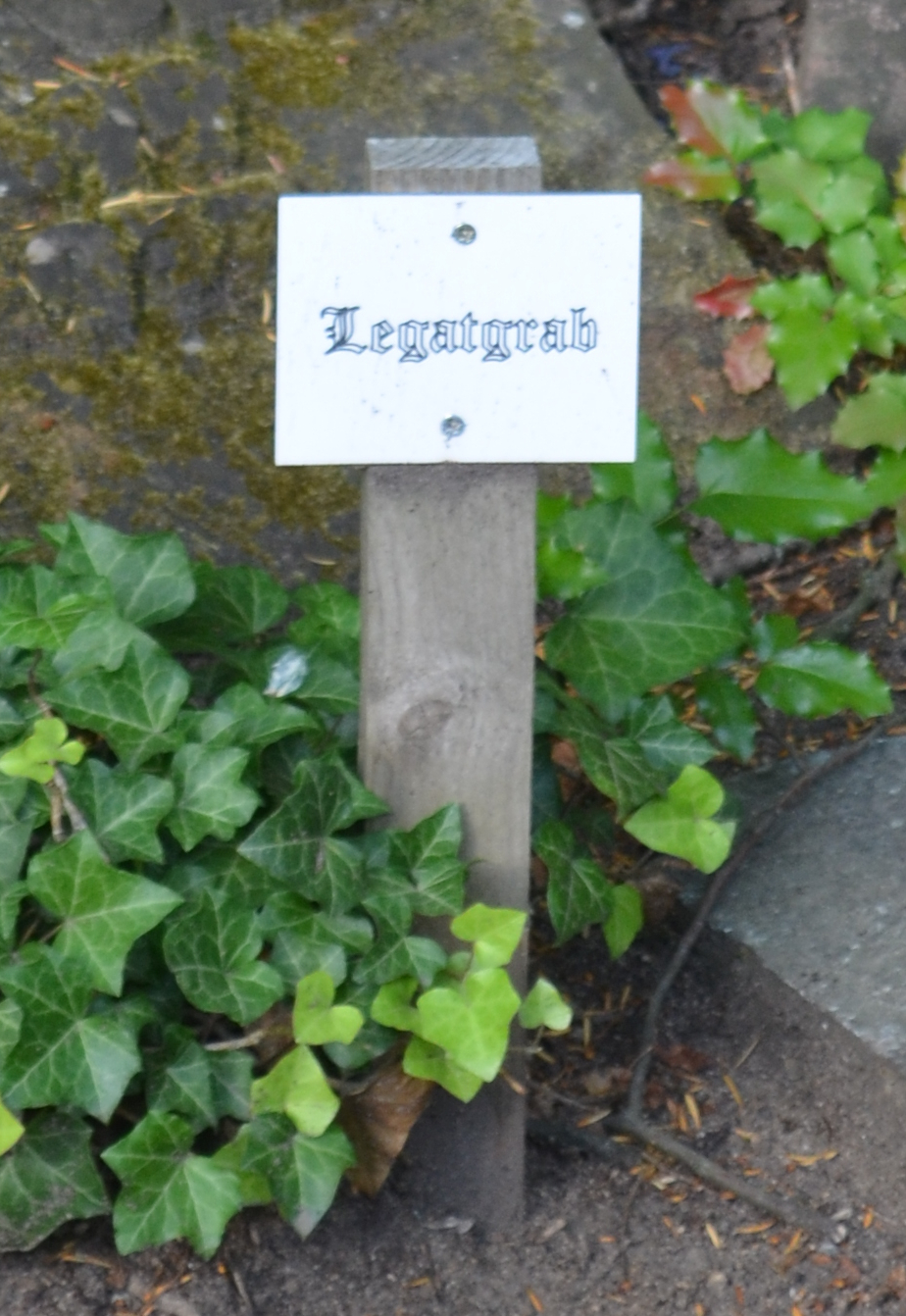 Offenbach, Alter Friedhof, Legatgrab